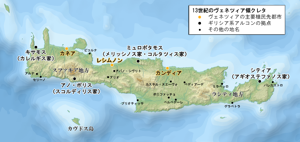 File:Greece (ancient) Crete (relief-cropped).pngをベースに、 高田良太 (June 2013) "第八章 一二〇四年とクレタ －外部勢力支配地域と中央政府の関係の変容－" in 井上浩一・根津由喜夫編 , ed. ビザンツ 交流と共生の千年帝国, 昭和堂, p. 212 ISBN: 978-4-8122-1320-9. ：地図2 高田良太 (2015-3). "中世クレタにおける見えないフロンティア : 都市カンディアの共生社会". 駒沢史学 84 : 24. 駒沢史学会. Retrieved on 2019-1.：図1 高田良太 (October 2015) "第21章 アレクシオスは平和の仲介者か" in 服部良久編著 , ed. コミュニケーションから読む中近世ヨーロッパ史, ミネルヴァ書房, p. 491 ISBN: 978-4-623-07278-1. ：図21-1 の情報を参考に作成。